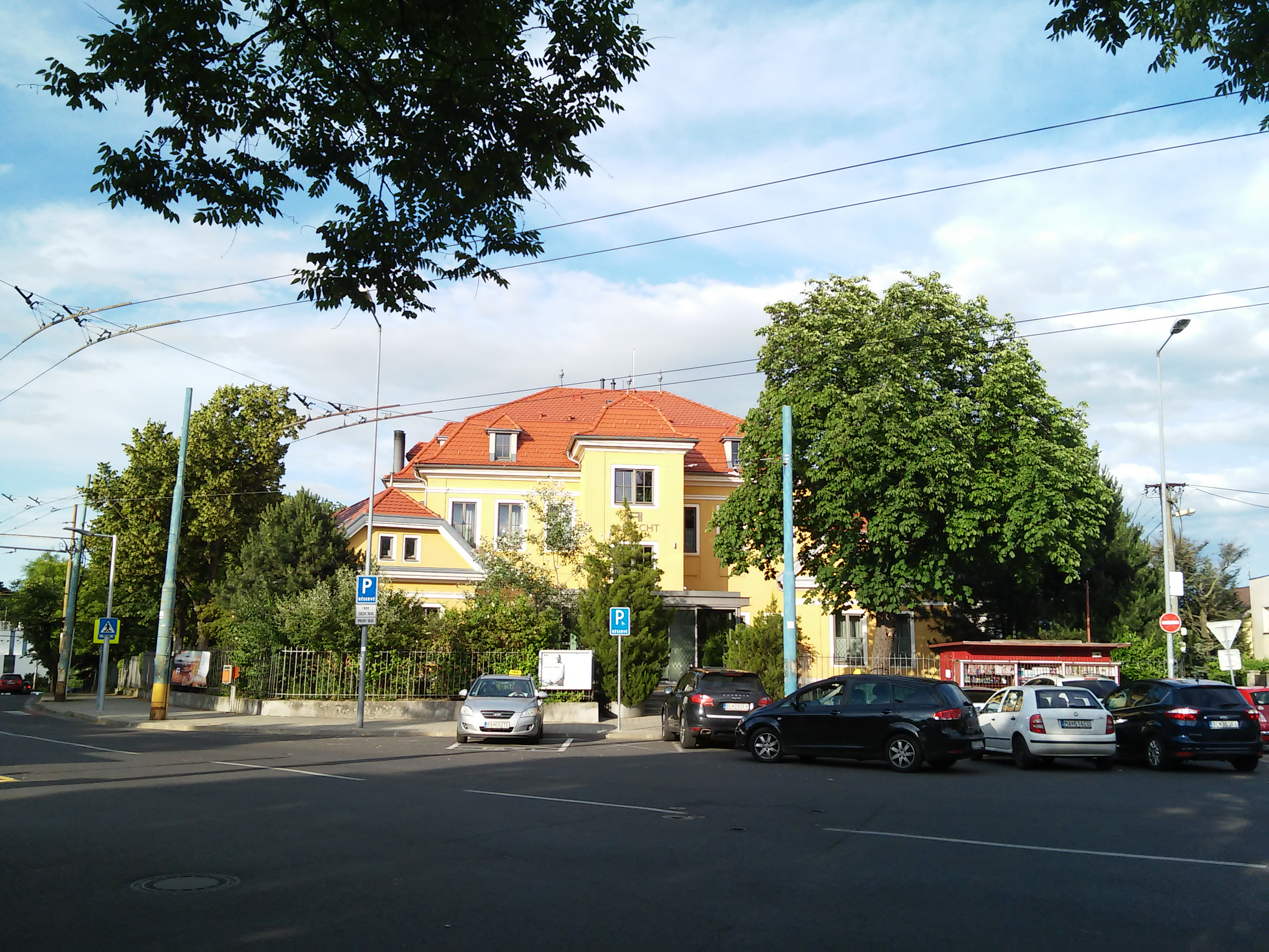 Hotel Albrecht, Mudroňova, Bratislava